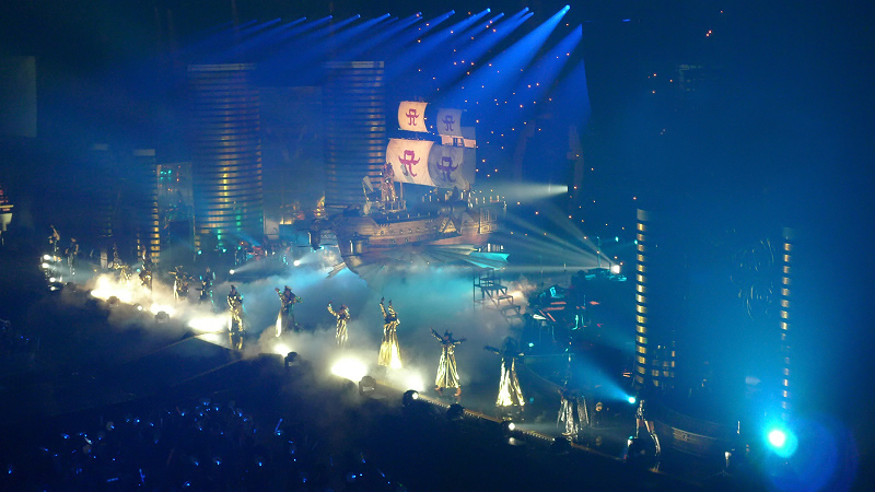 Ayumi Hamasaki Asia Tour 2008 Shanghai